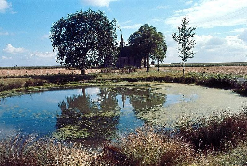 L'église Saint-Just, Fresnay-le-Gilmert, Eure-et-Loir, France.